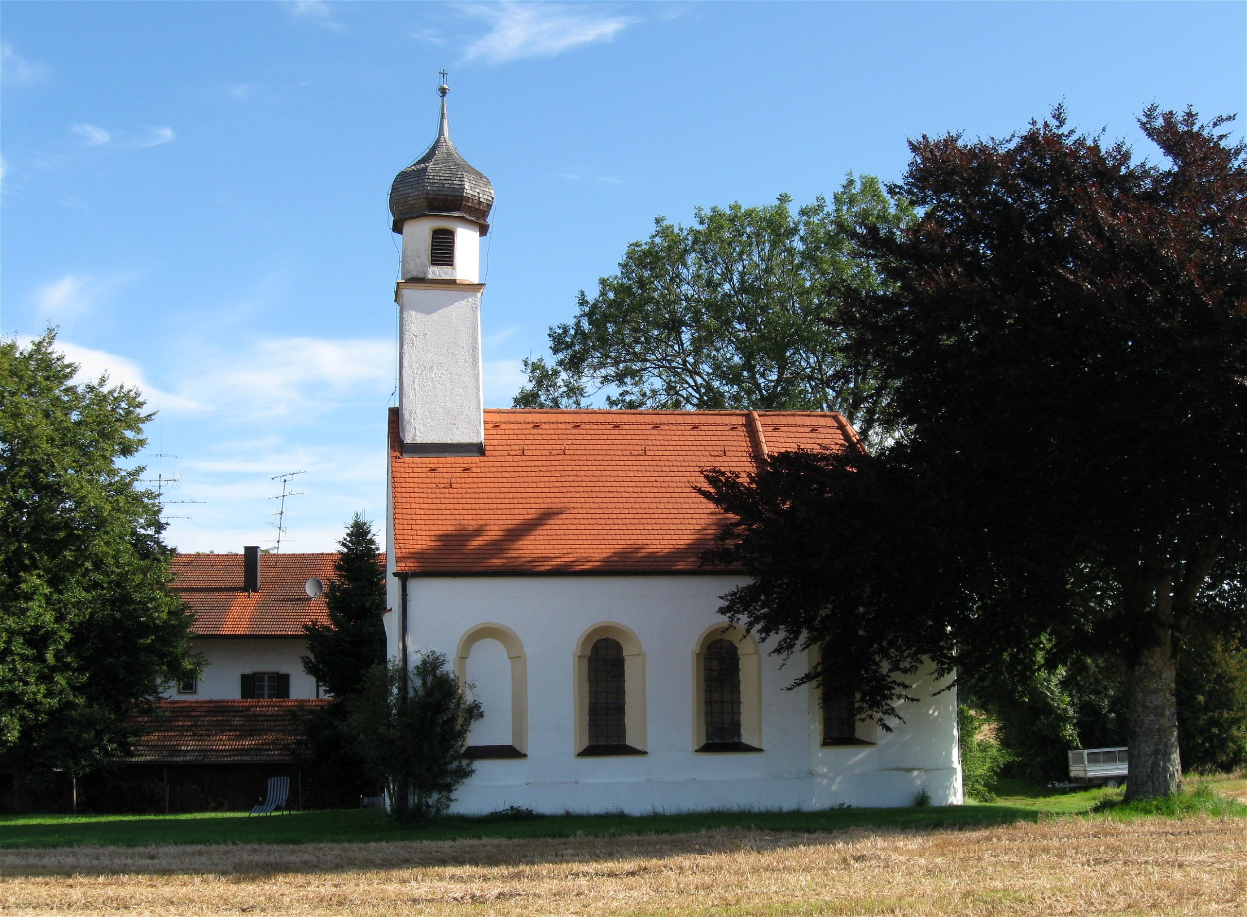 Wolfersberg; Kapelle St. Ulrich, mit Dachreiter, 1. Hälfte 18. Jh.; mit Ausstattung.